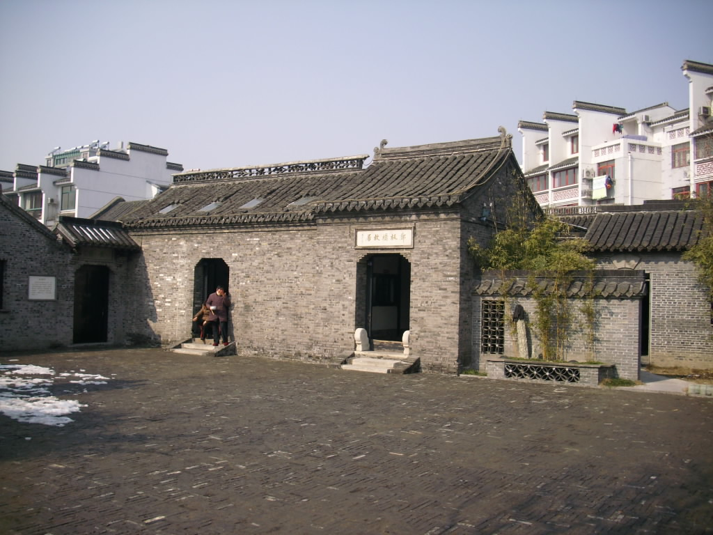 兴化郑板桥故居